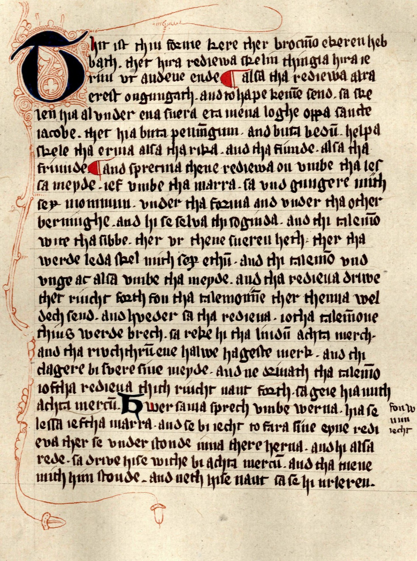 Anfang des Brokmerbriefs, aus der Zweite Brokmer Handschrift (B2)